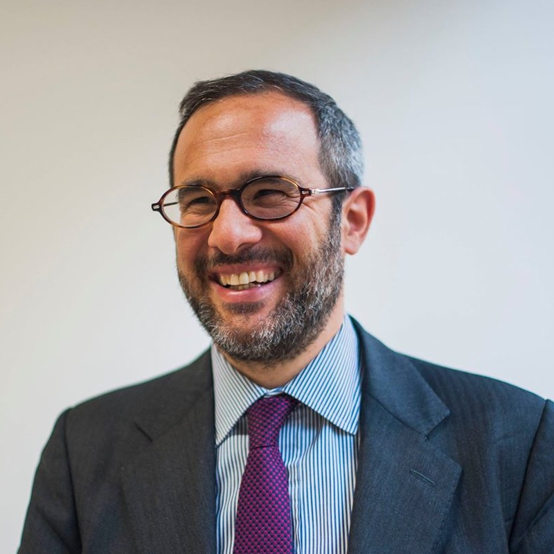 Fotografia di Umberto Ambrosoli, avvocato e politico italiano.